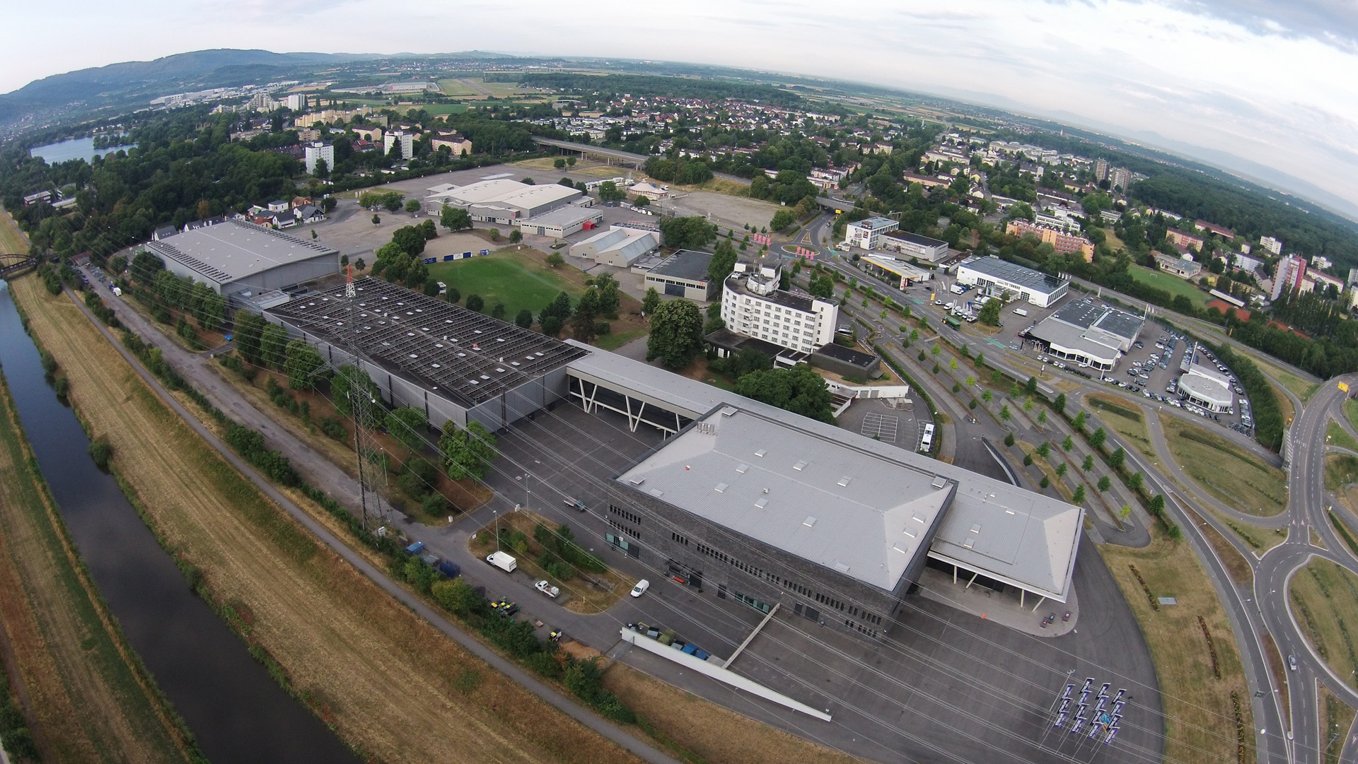 Eine Luftaufnahme der Messe Offenburg-Ortenau mit der Oberrheinhalle im Vordergrund (Rückansicht). Rechts die (neue) Oberrheinhalle, in der Mitte die Ortenauhalle, ganz links eine weitere Messehalle.